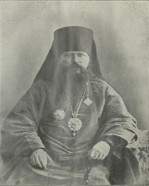 Преосвященнейший Палладий, Епископ Пермский и Соликамский